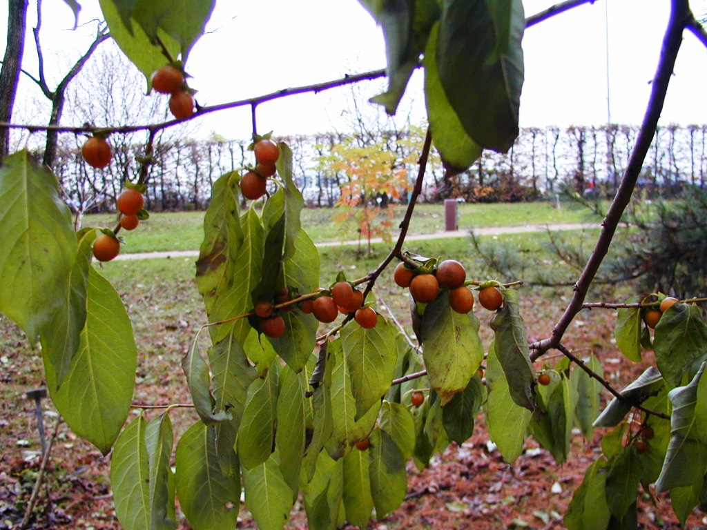 Lotuspflaume